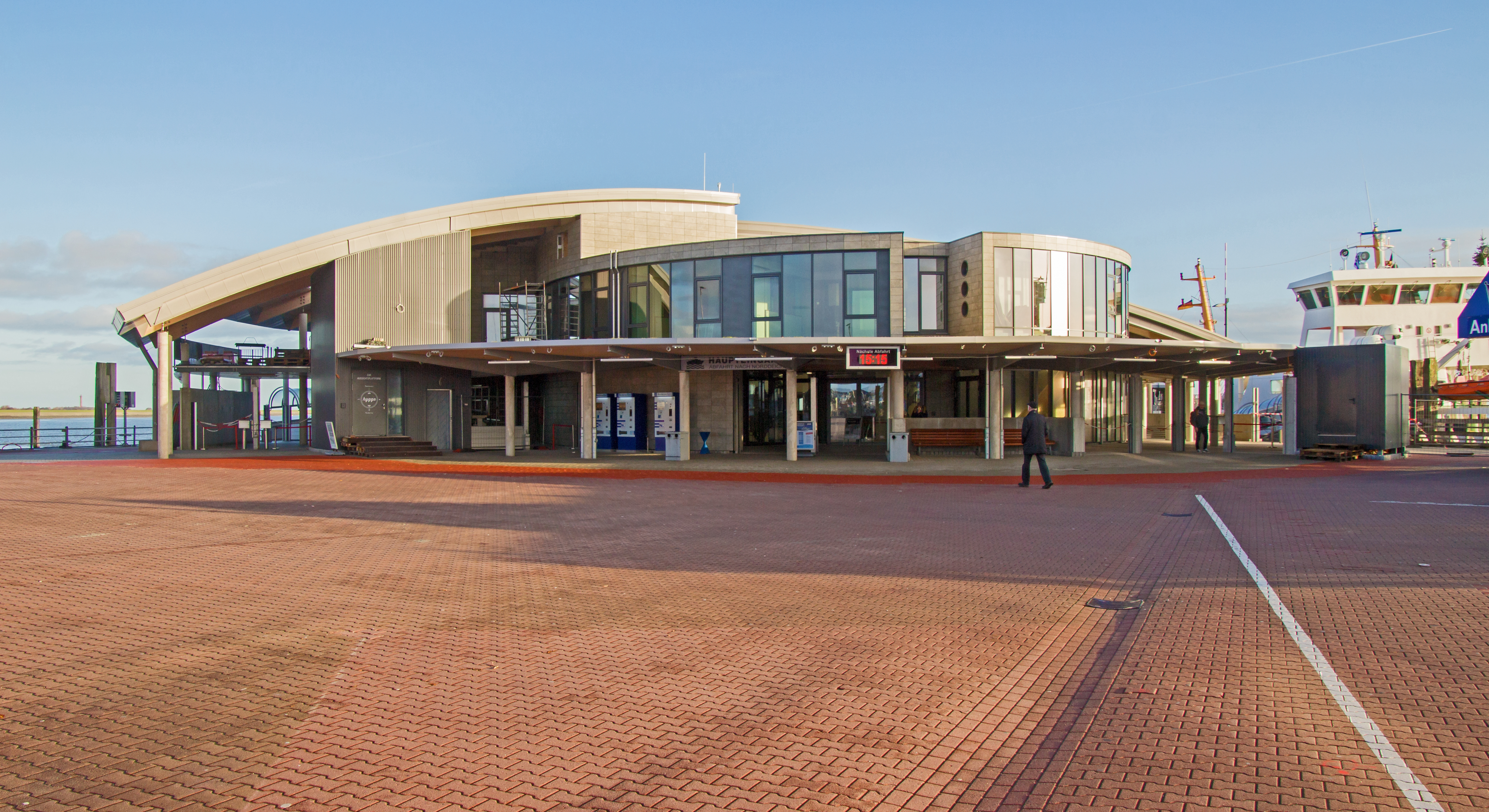 Verwaltungssitz der "AG Reederei Norden-Frisia" am Molenkopf des Hafens mit Personenterminal - Nordseeheilbad Norderney, Niedersachsen, Deutschland